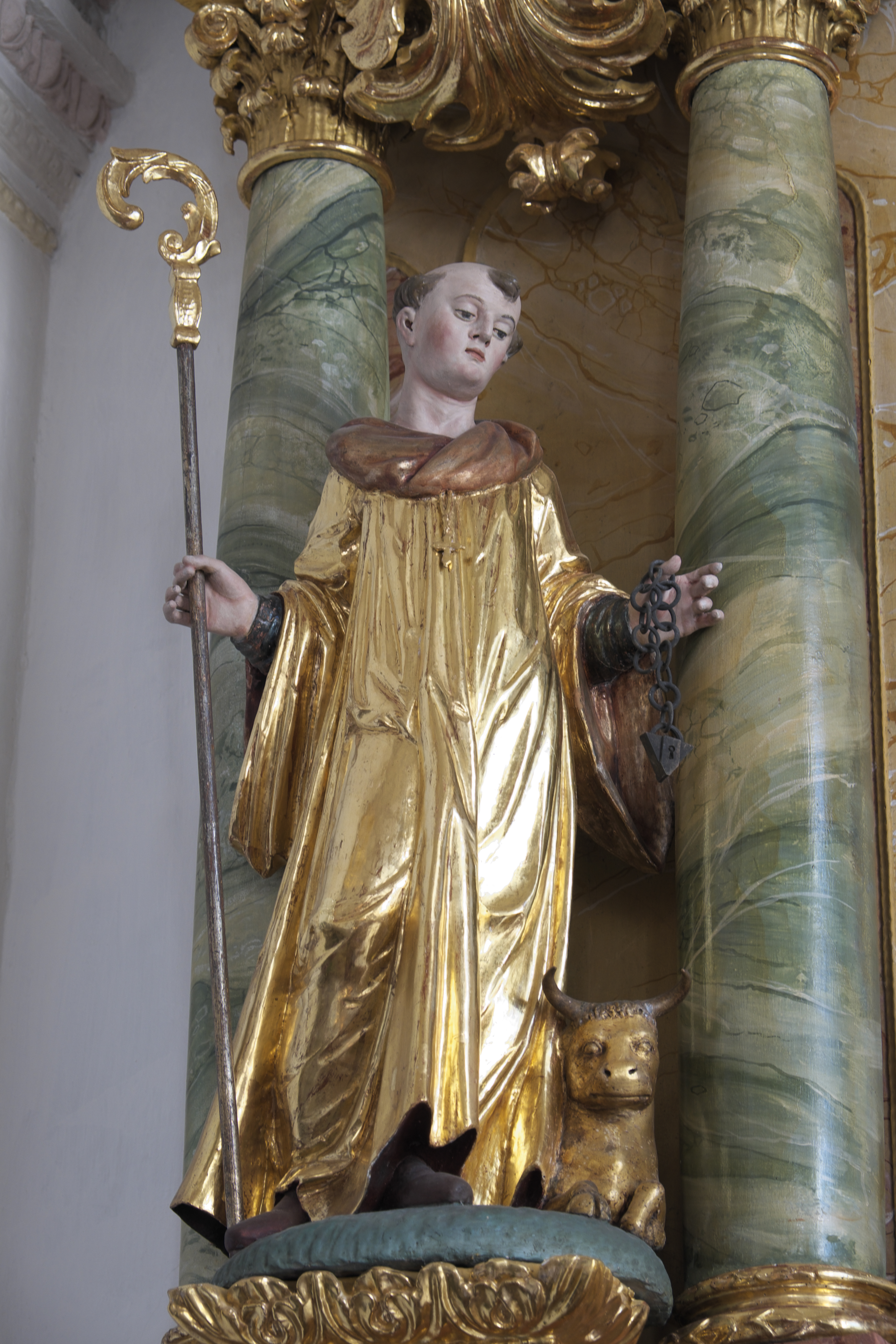 Katholische Pfarrkirche St. Michael in Rottbach (Maisach) im Landkreis Fürstenfeldbruck (Bayern/Deutschland), Hochaltar von 1699, Skulptur des heiligen Leonhard